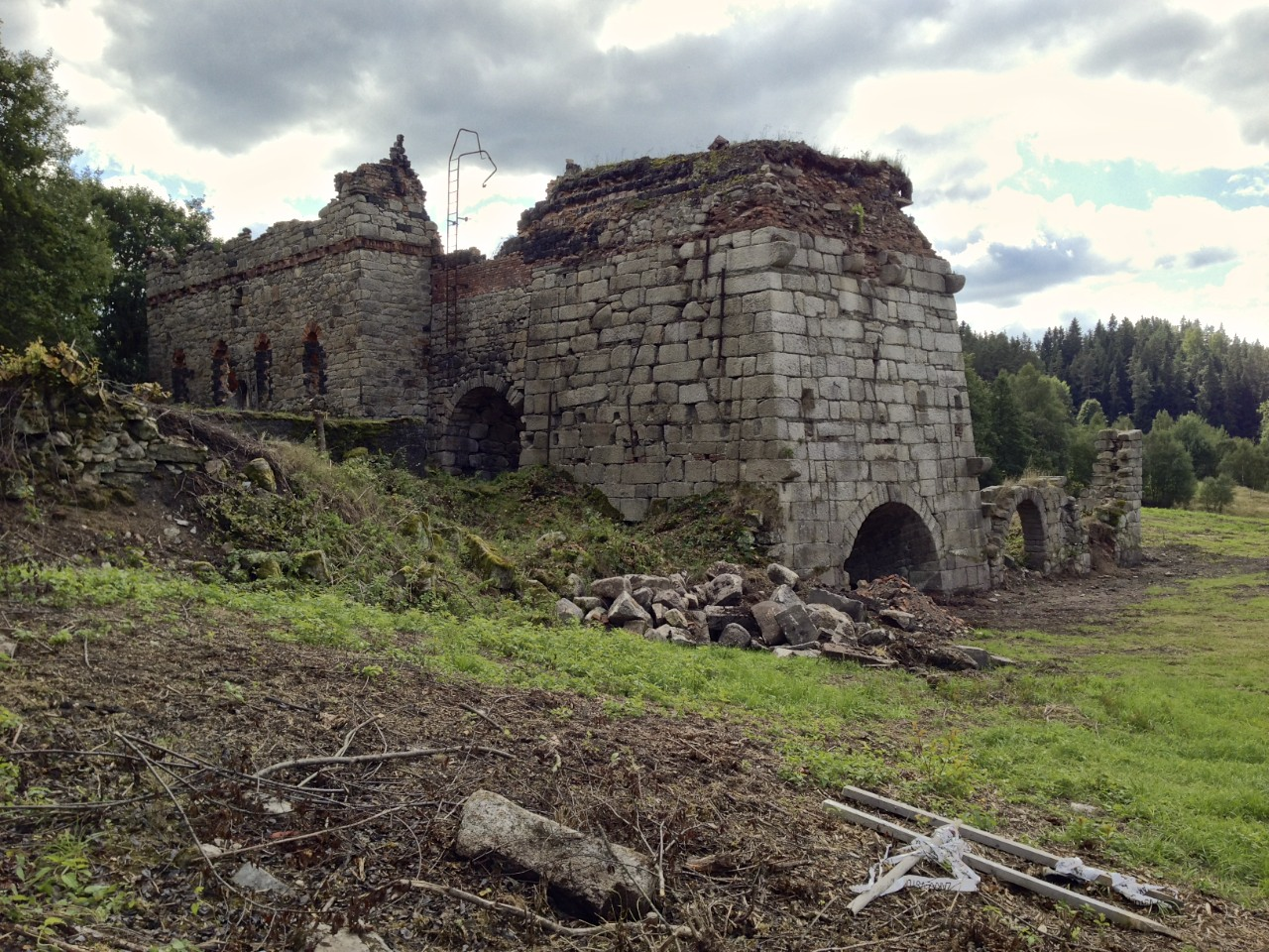 Huť v Šindelové, boční pohled od severu. Vpravo vysoká pec, vlevo provozní budova, uprostřed tunel náhonu vodního kola.